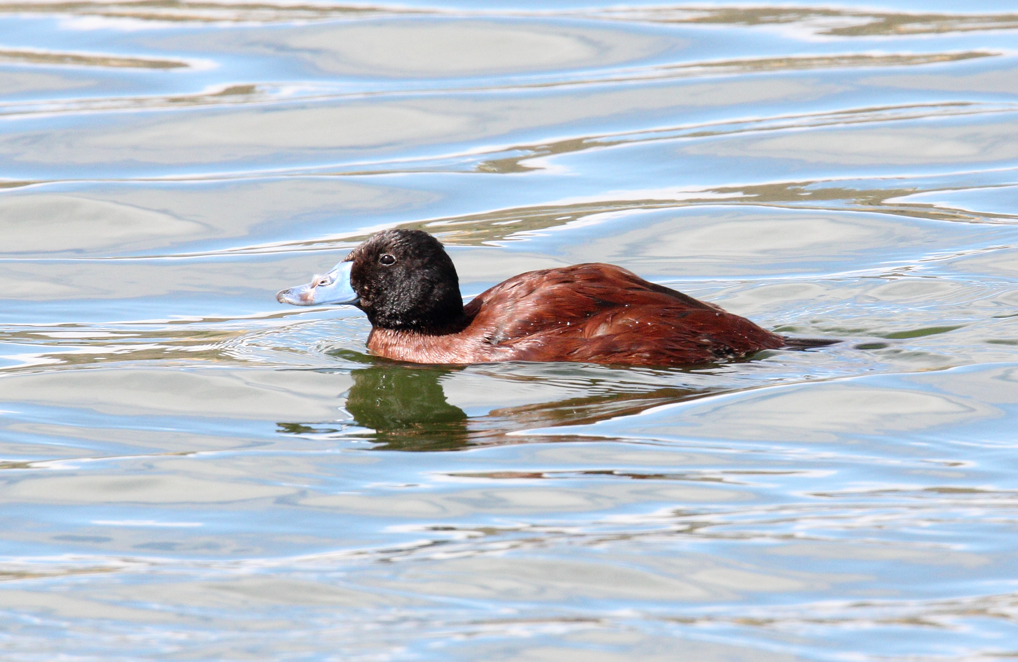 Lake Duck (Oxyura vittata)